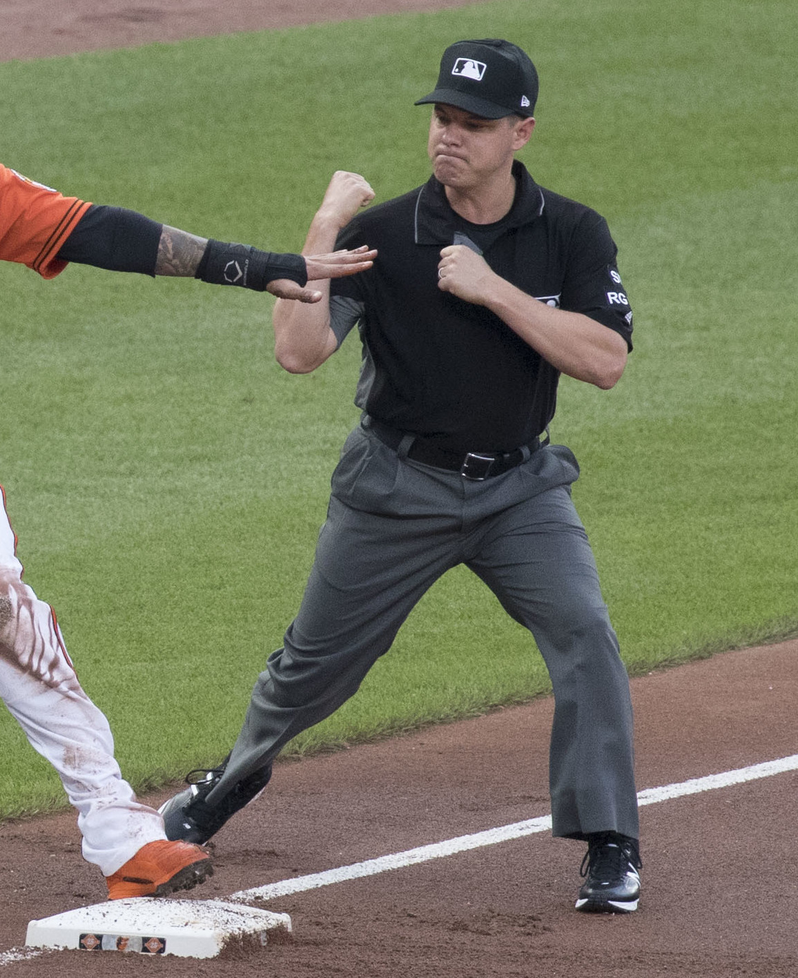 Cubs at Orioles 7/15/17